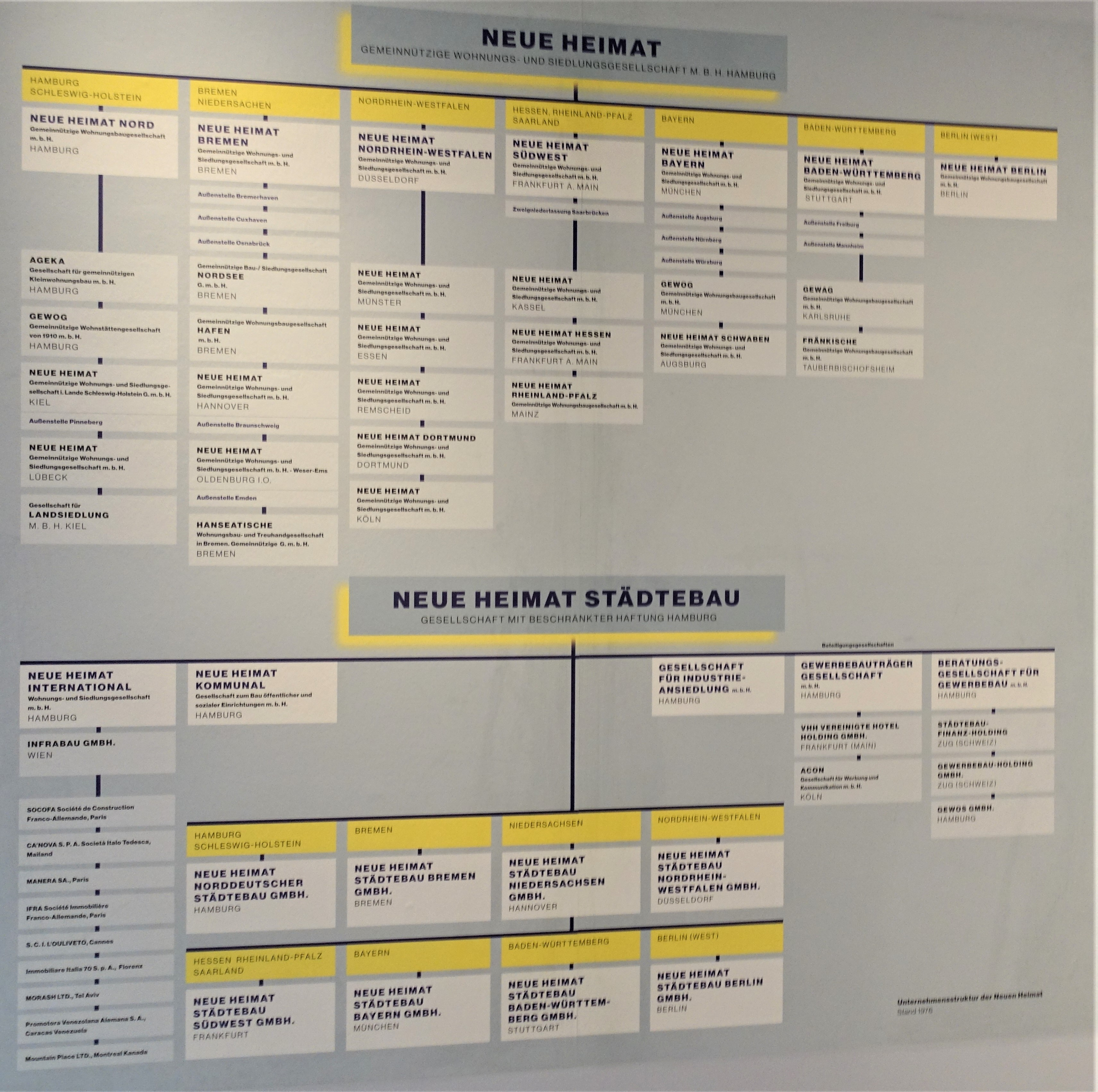 Unternehmensstruktur des Wohnungsbauunternehmens "Neue Heimat" Stand 1976